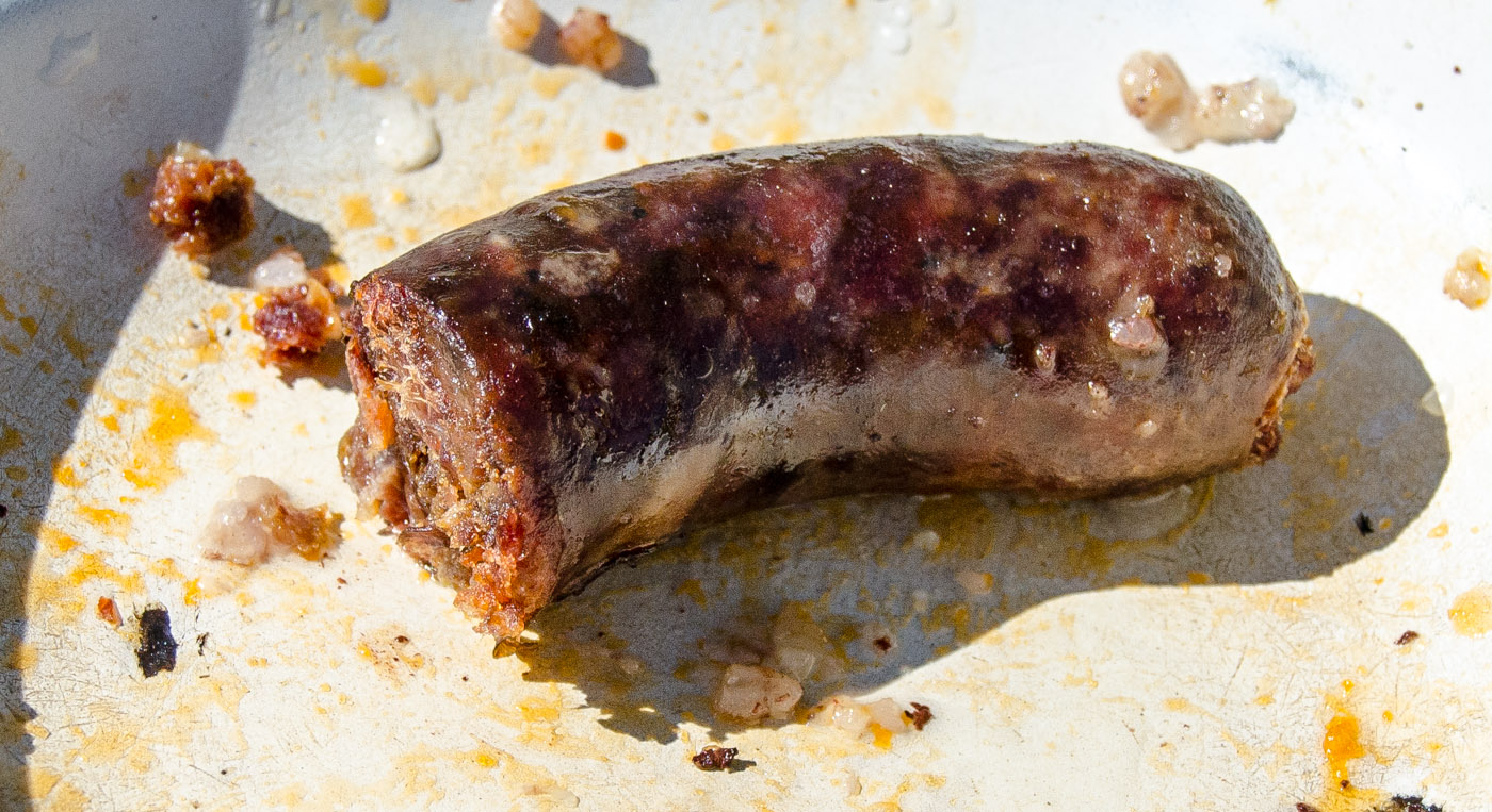 Sabadeño hecho en Sandoval de la Reina. Cocido con el corte a la vista.